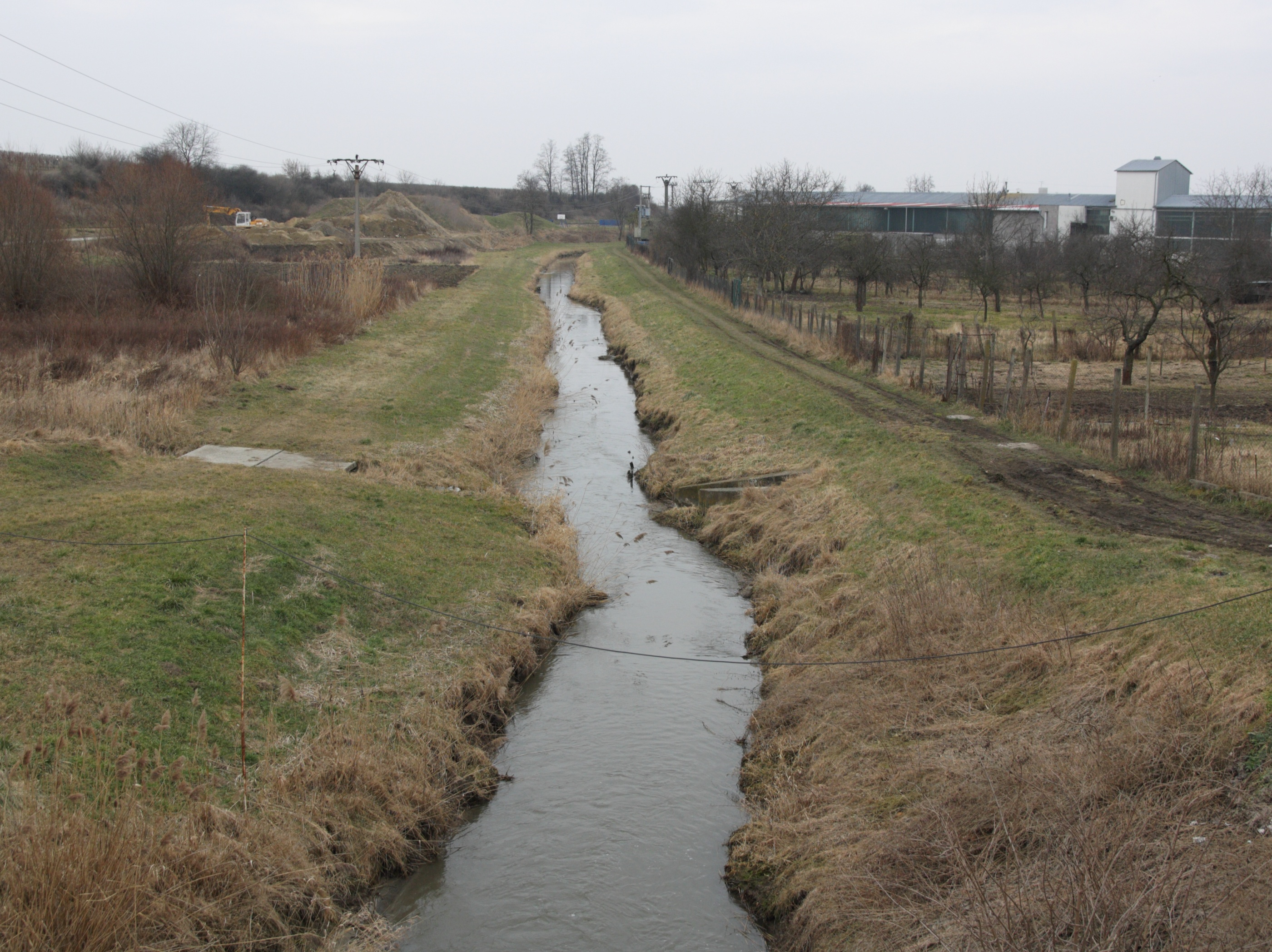 Velké Pavlovice - Trkmanka z mostu, ulice Pod Břehy.